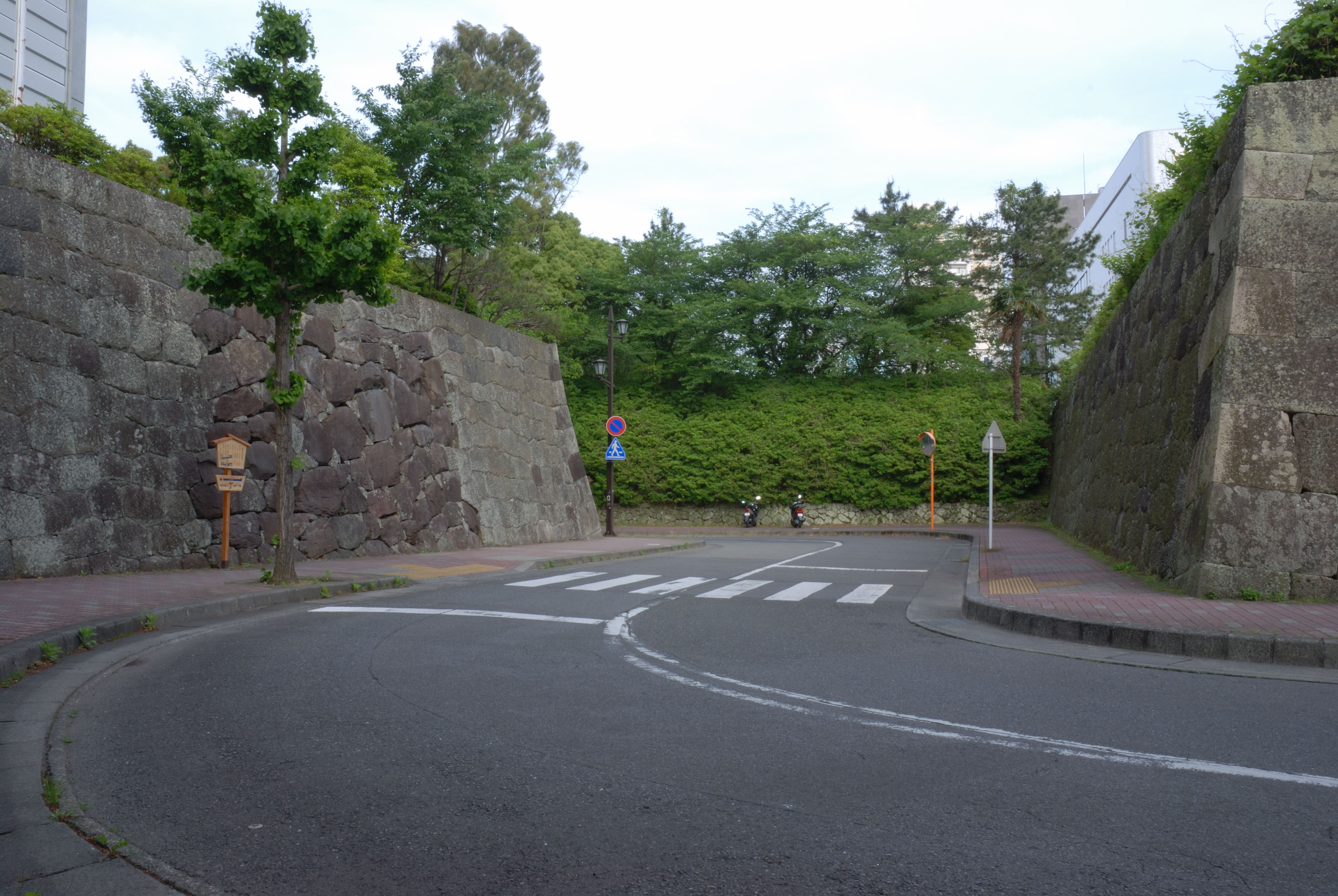 Otegomon masugata